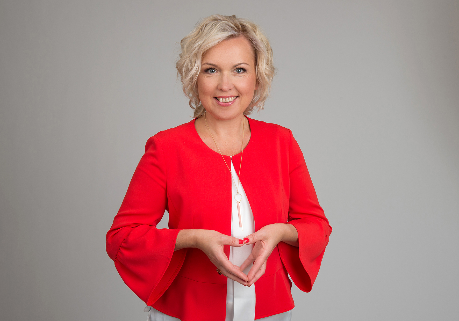 Ingrid Veidenberg